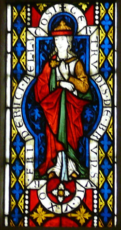 Gertruda Brunšvická